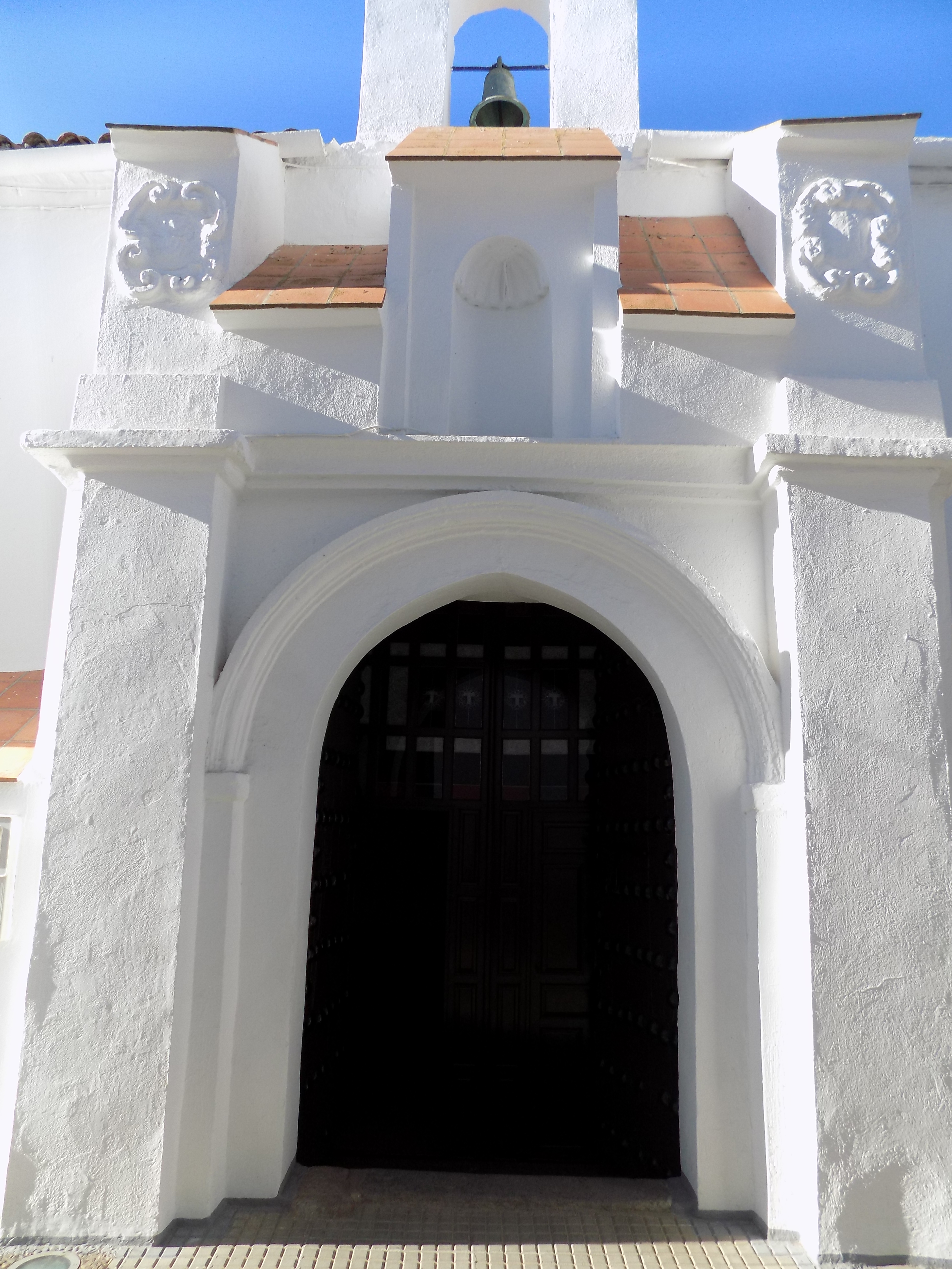 Exterior de la Ermita de la Caridad de Fuente Obejuna, provincia de Córdoba, (España).